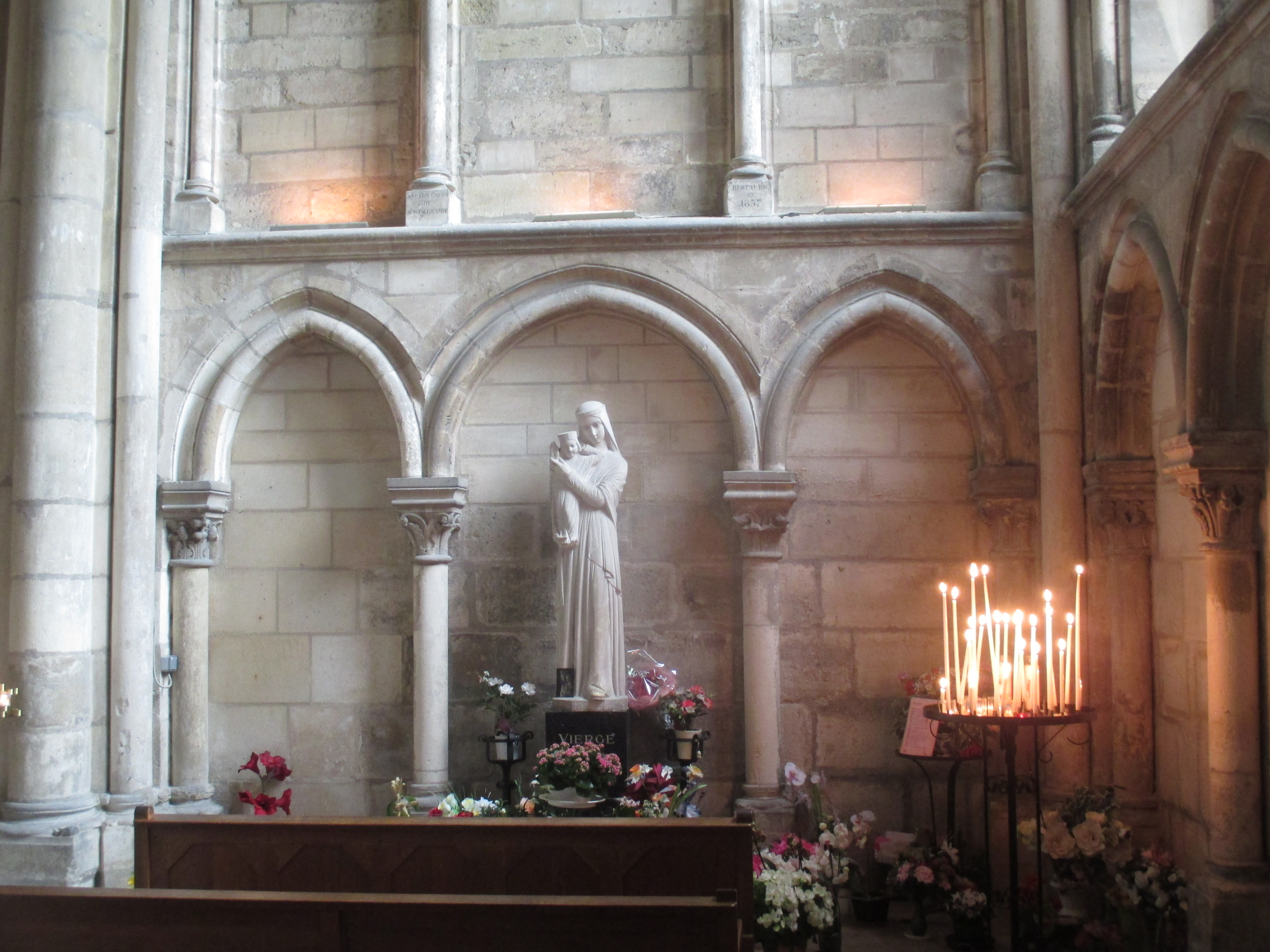 Chapelle de la Vierge du Vœu. Transept Sud de la Basilique Saint-Rémi de Reims.